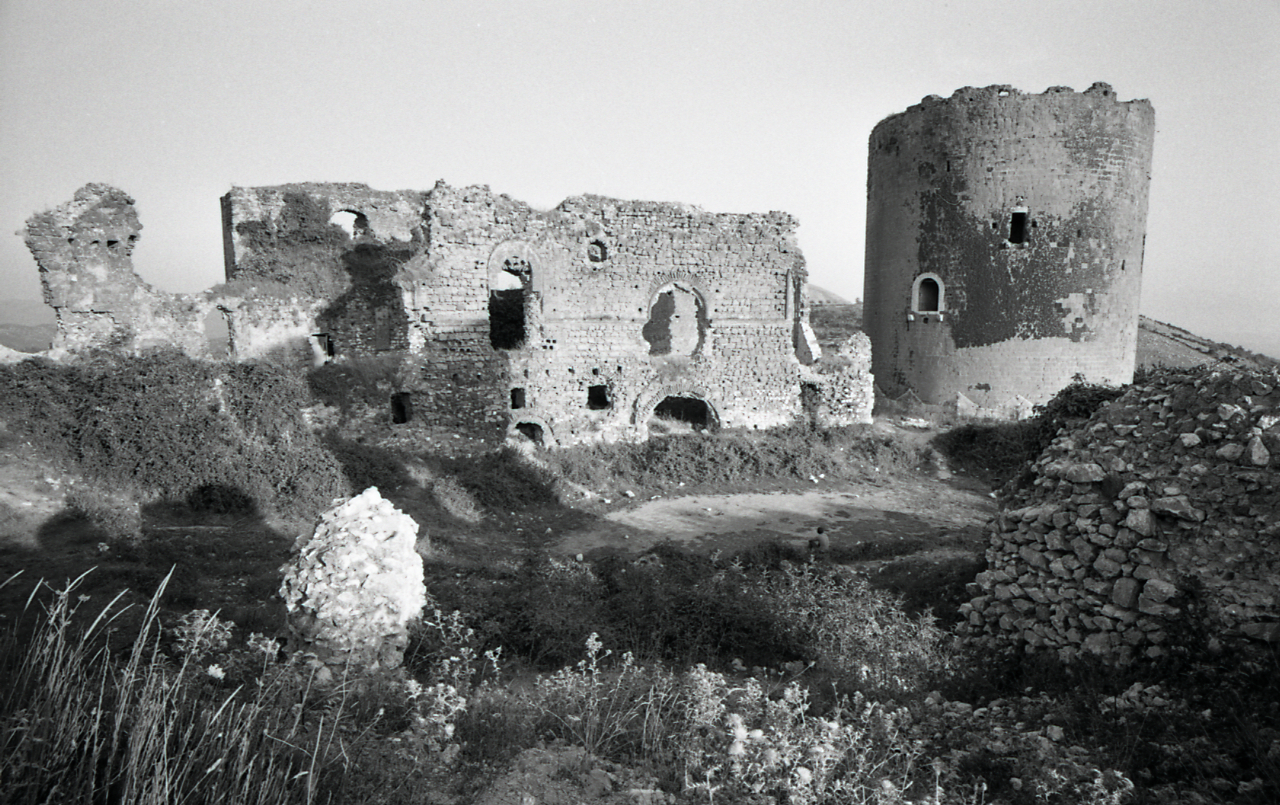 Servizio fotografico : Caserta, 1965 / Paolo Monti. - Strisce: 3, Fotogrammi complessivi: 16 : Negativo b/n, gelatina bromuro d'argento/ pellicola ; 35 mm. - ((I fotogrammi hanno una doppia numerazione. - Sul portanegativi: Leica ISS. - Occasione: Pubblicazione: "Emilio CECCHI, Natalino SAPEGNO (a cura di), Storia della Letteratura Italiana, 9 voll., Milano, Garzanti, 1966 e segg."